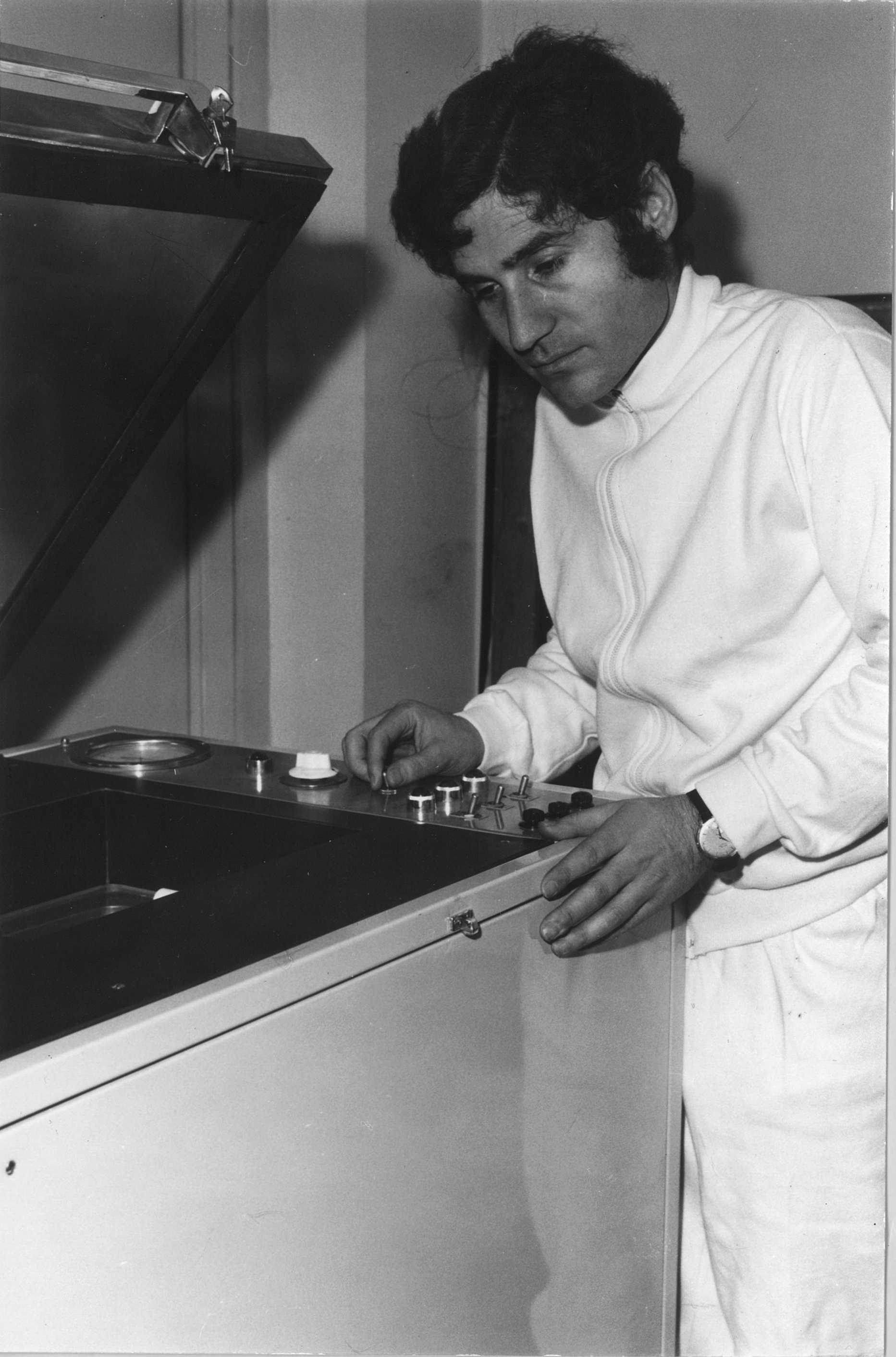 l'artista Giovanni Valentini davanti ad un congelatore ad azoto liquido